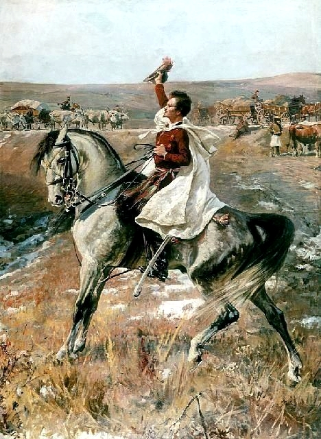 Petőfi Sándor alakja a Panorama Siedmiogrodzka című körképen